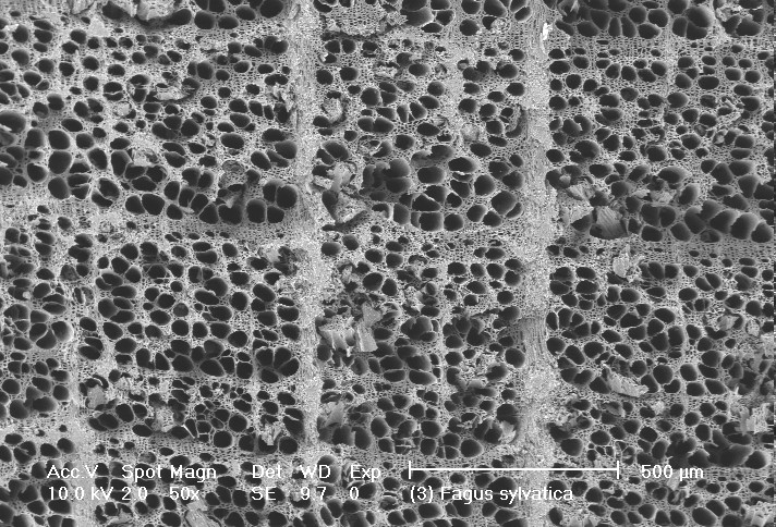 Fagus sp. (Buche), Holzkohle aus einer spätbronzezeitlichen Erzverarbeitungsanlage bei Brixlegg (Tirol). Querbruch im Rasterelektronenmikroskop